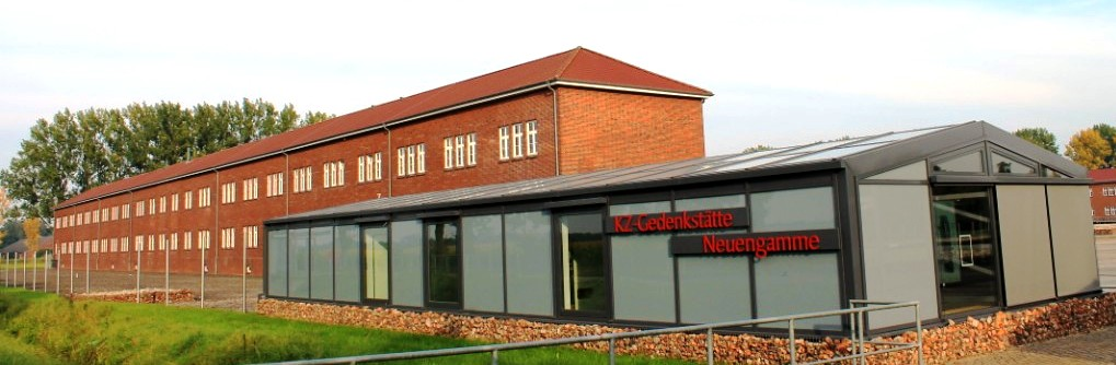 Eingang zu ehemaligen KZ Neuengammen